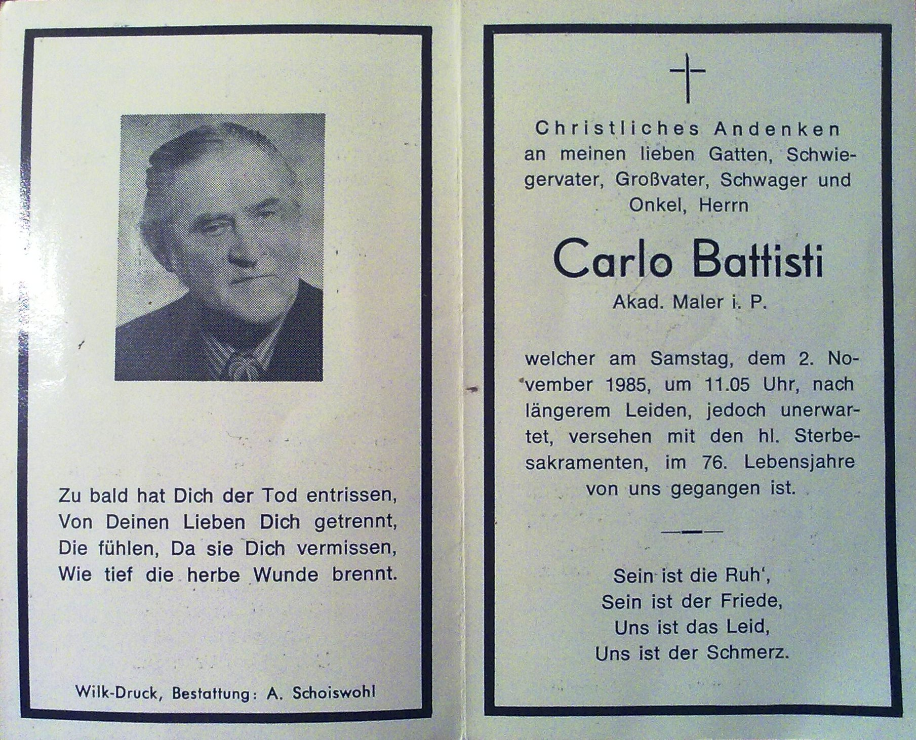 Scan von Patezettel aus Privatarchiv